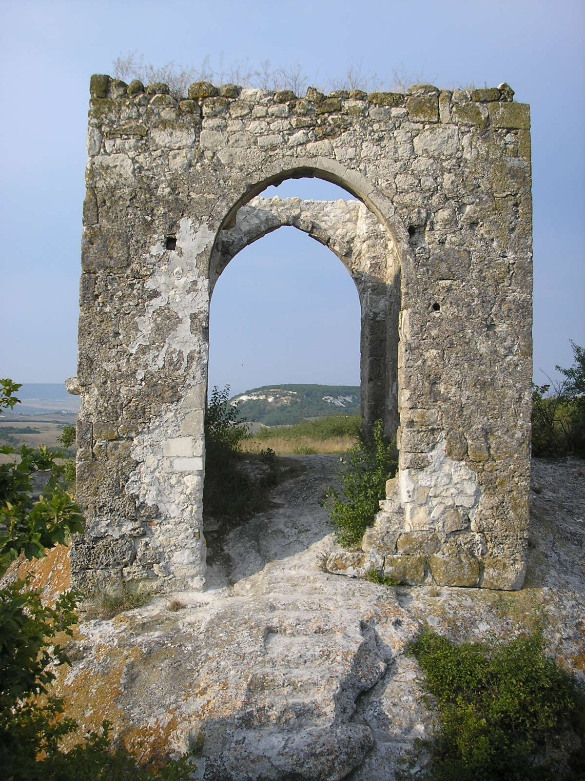 Башня Кыз-Куле на Эски-Кермене